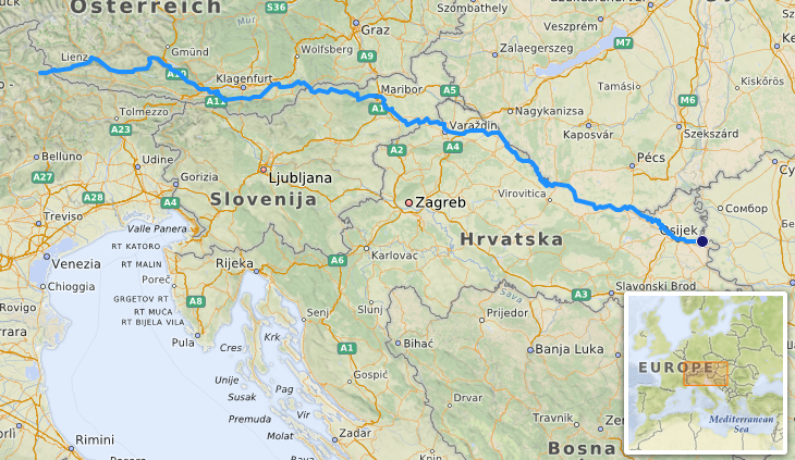 carte réalisée sur umap [1] This map may be incomplete, and may contain errors. Don't rely solely on it for navigation.